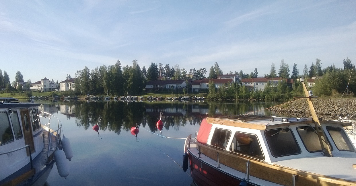 Päijänteeseen pistävä Samulinniemi on Jyväskylän arvostetuimpia asuinalueita